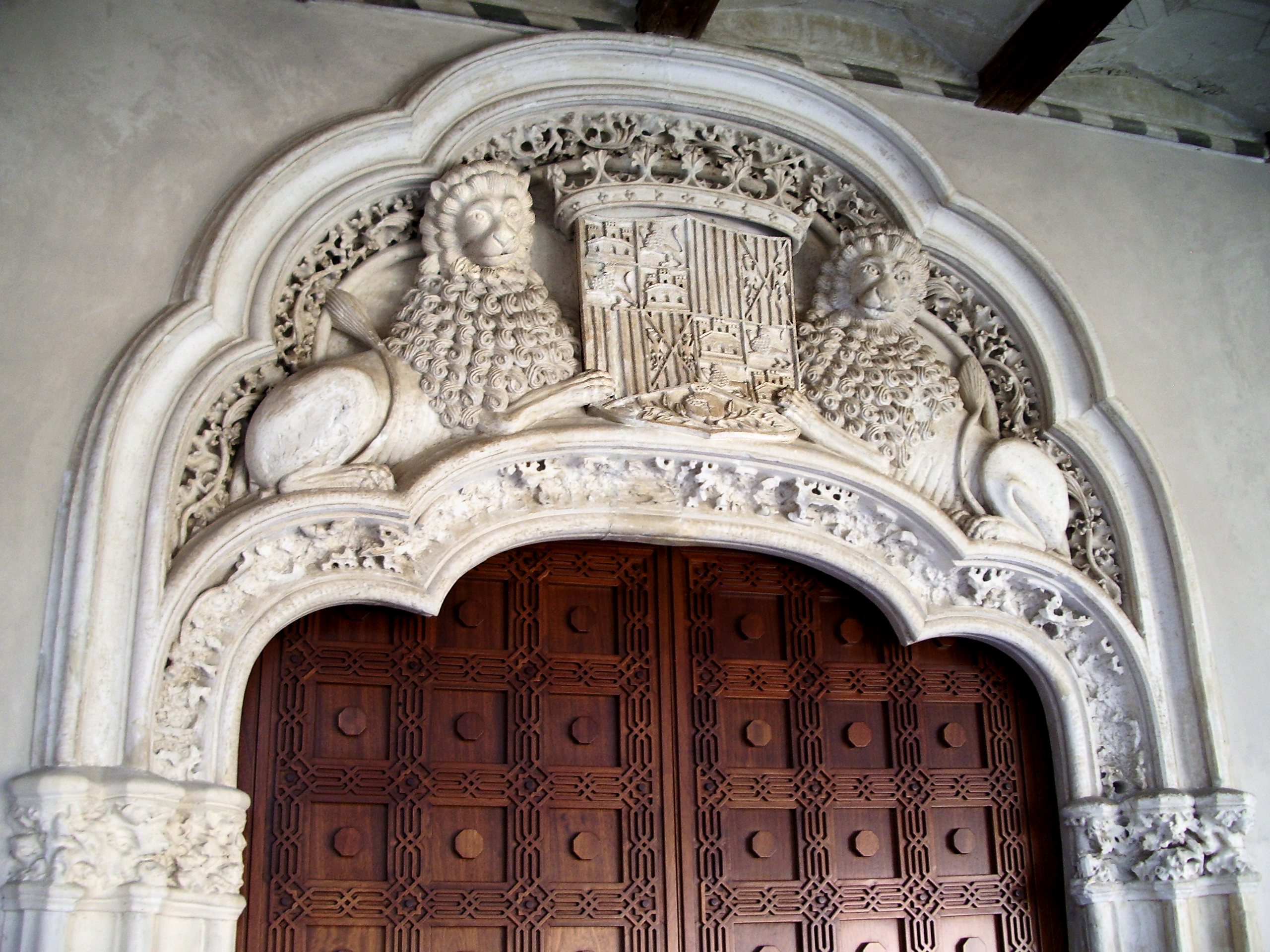 Arco principal del palacio de los Reyes Católicos en la Aljafería